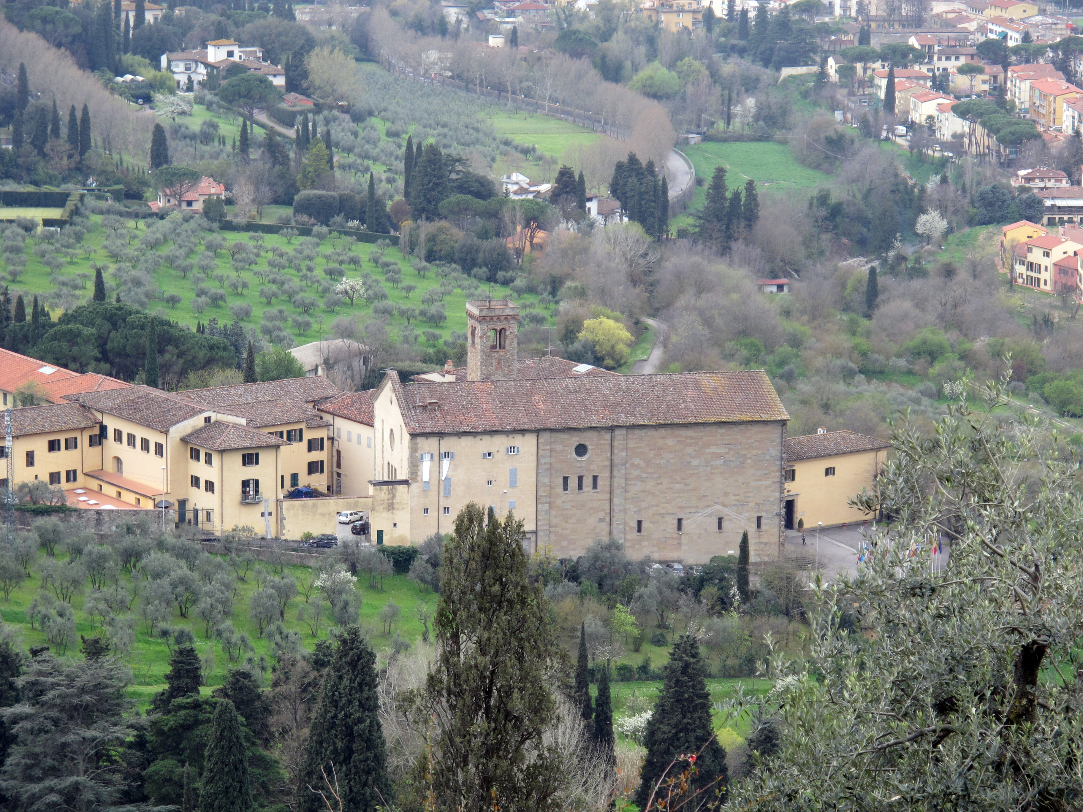 Le balze, veduta su badia fiesolana